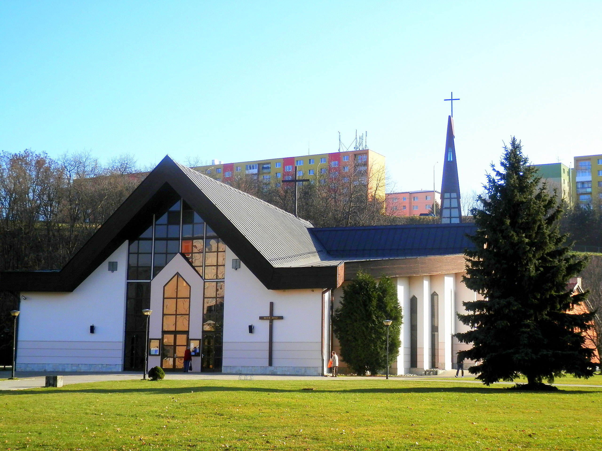 Kostol Krista Kráľa. Postavený vianočný strom, námestie Krista Kráľa, mesto Prešov, sídlisko Sekčov. Slovensko.